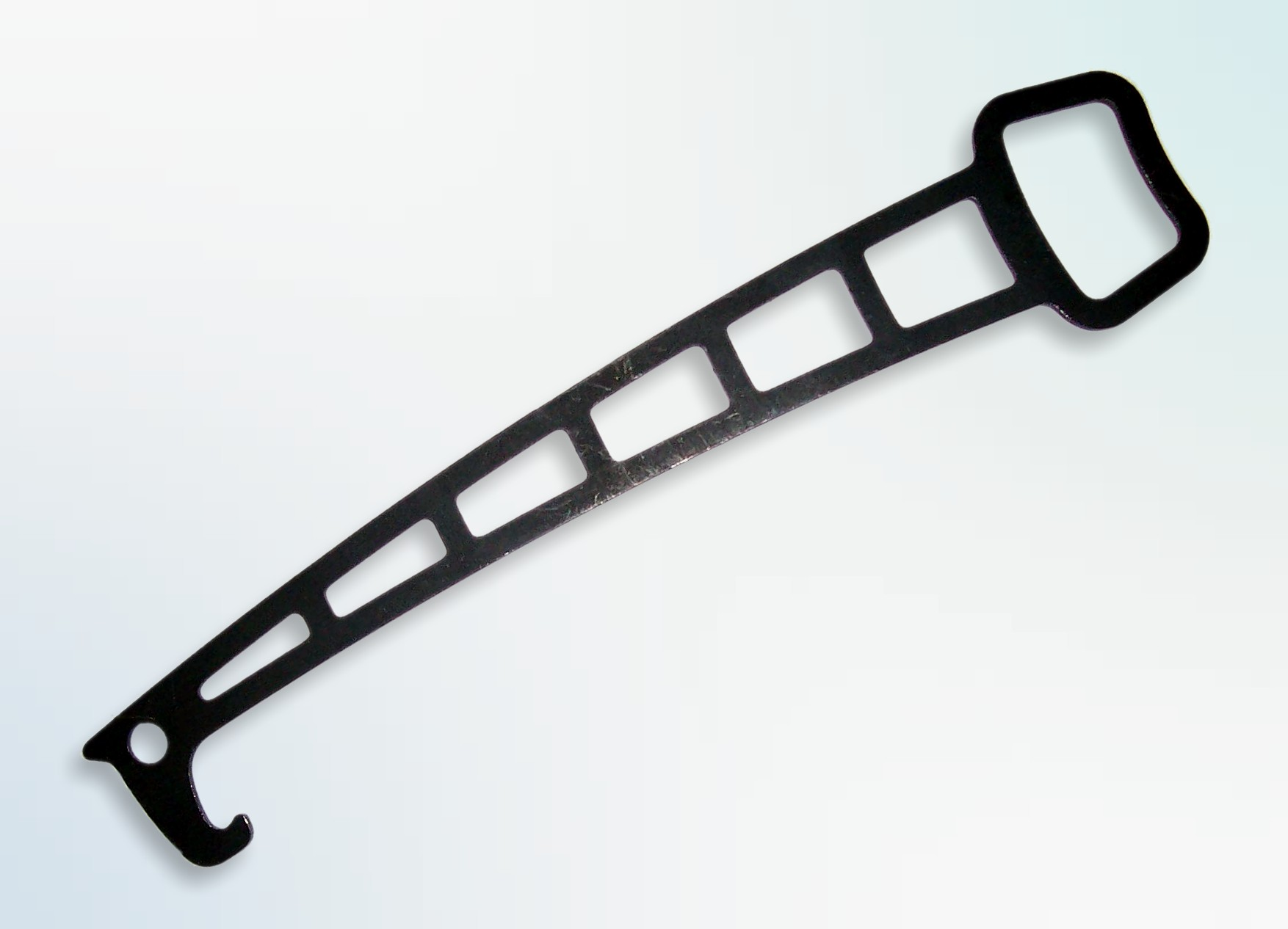 nut tool